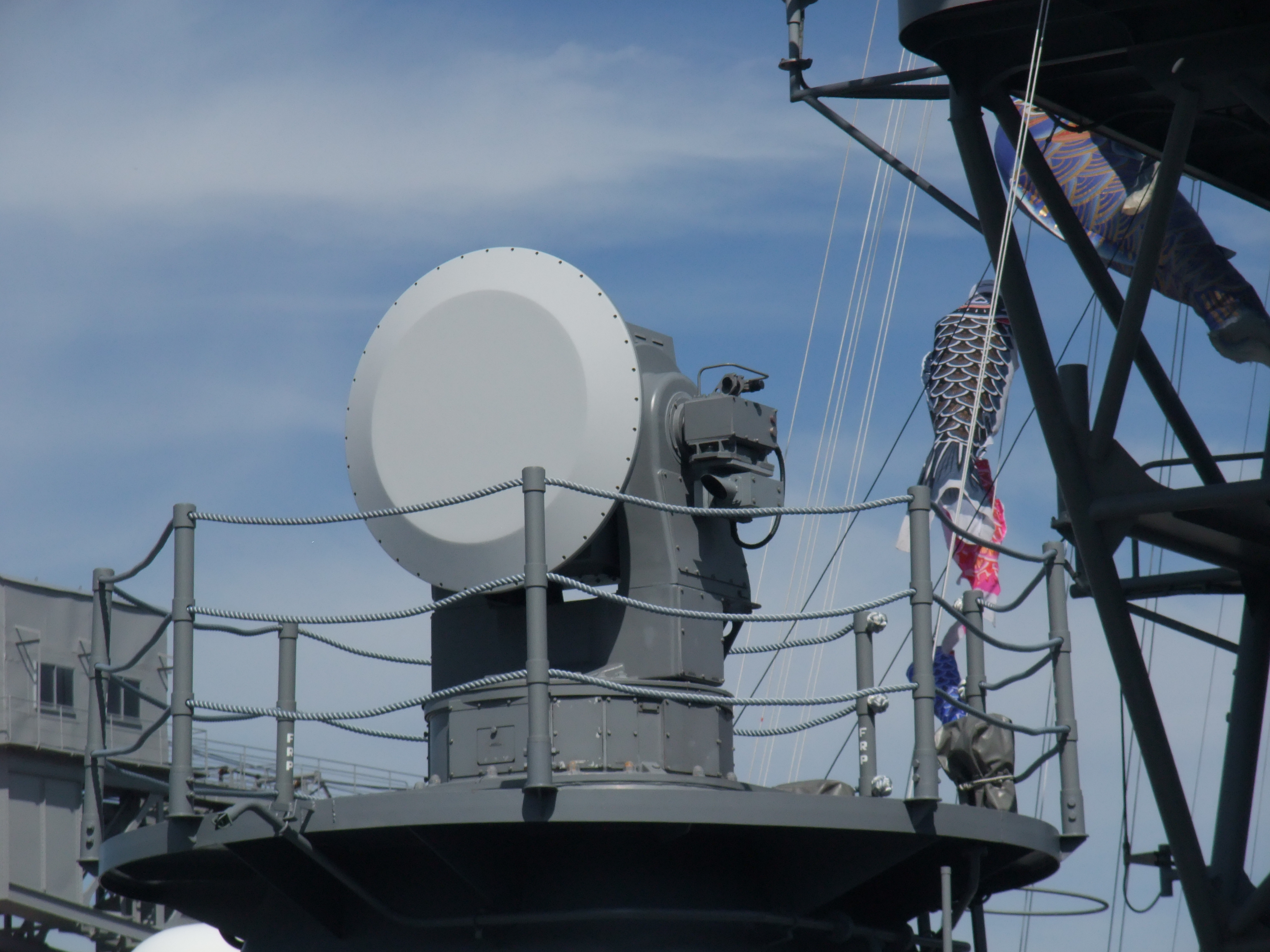 護衛艦「やまゆき」（JS Yamayuki, DD-129）搭載のFCS-2-21Aの方位盤。